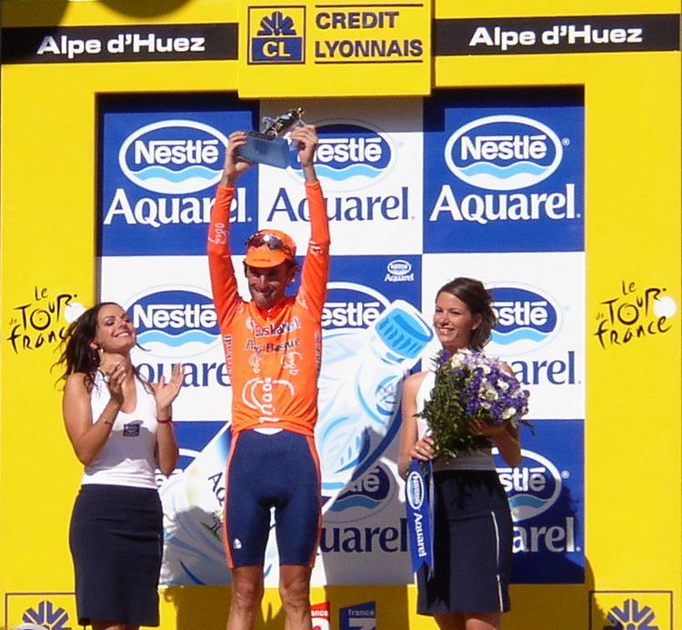 Iban Mayo, vencedor de la octava etapa del Tour de Francia, Sallanches - L'Alpe d'Huez.